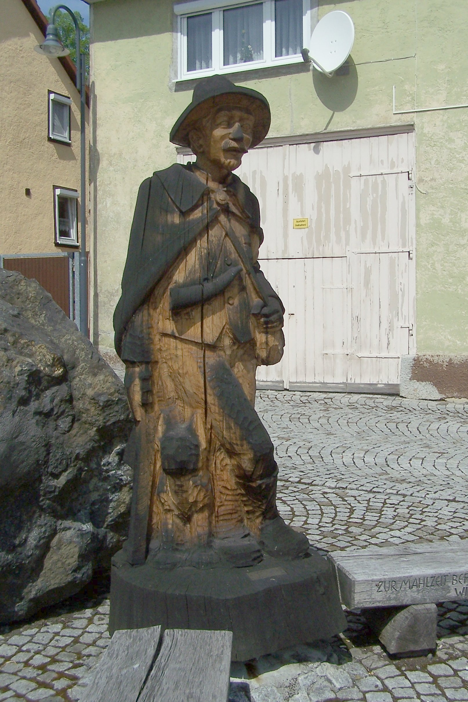 Detailsansicht - der Berghirte.